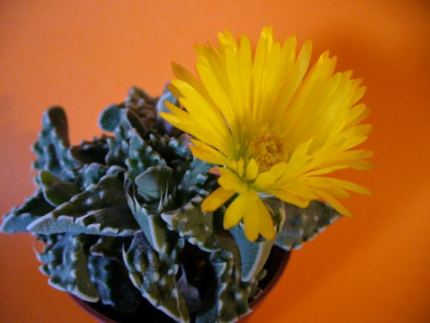 Faukario